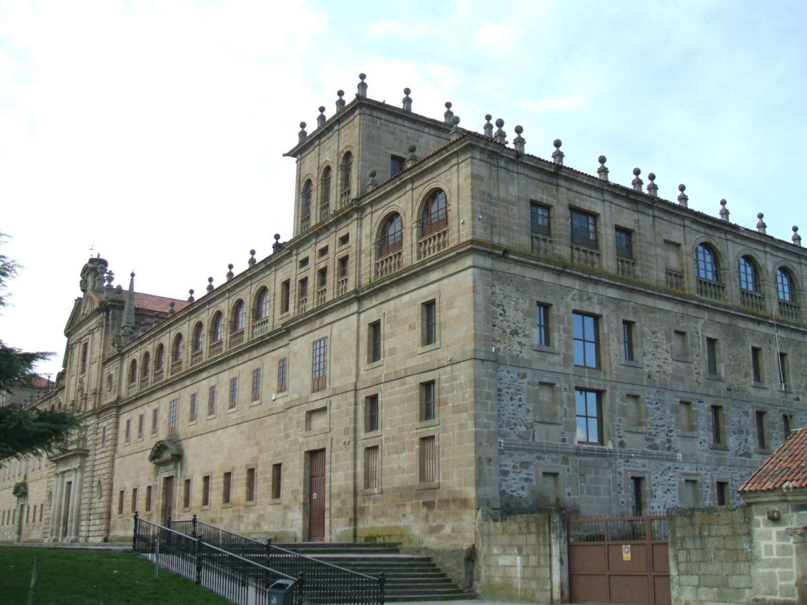 Monforte de Lemos - Colegio de Nuestra Señora de la Antigua (PP Escolapios)